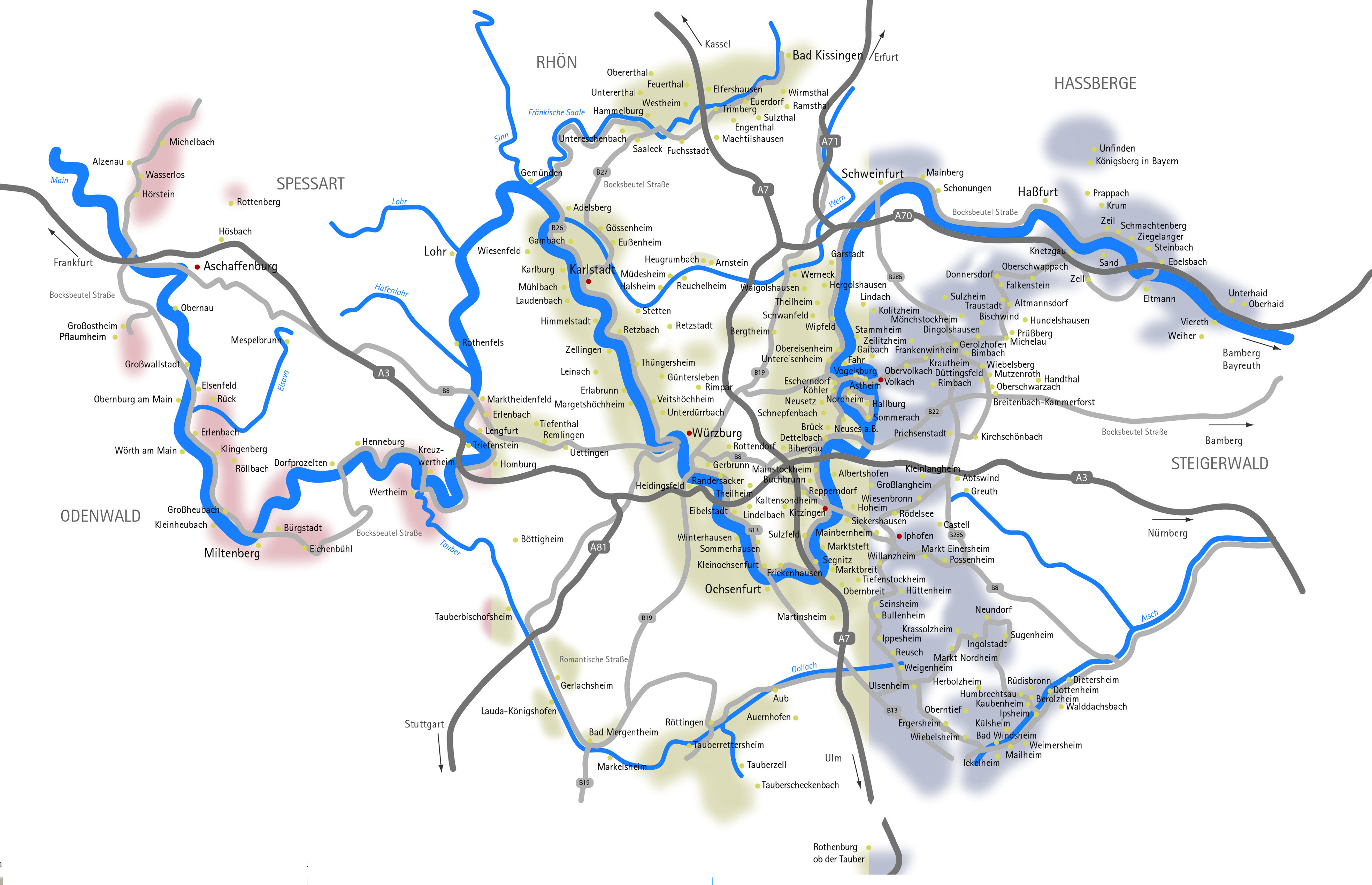 WeinFranken Foto: Fränkischer Weinbauverband e.V.